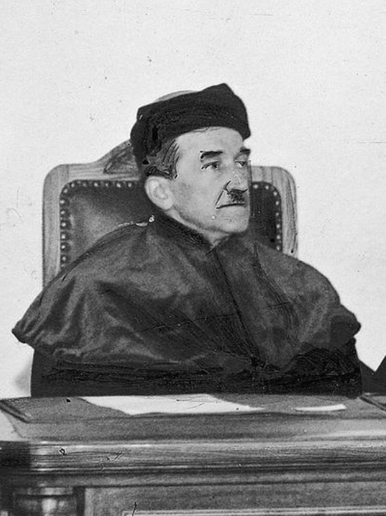 Karol Bernaczek - sędzia Trybunału Kompetencyjnego, a później Przewodniczący Inwalidzkiego Sądu Administracyjnego